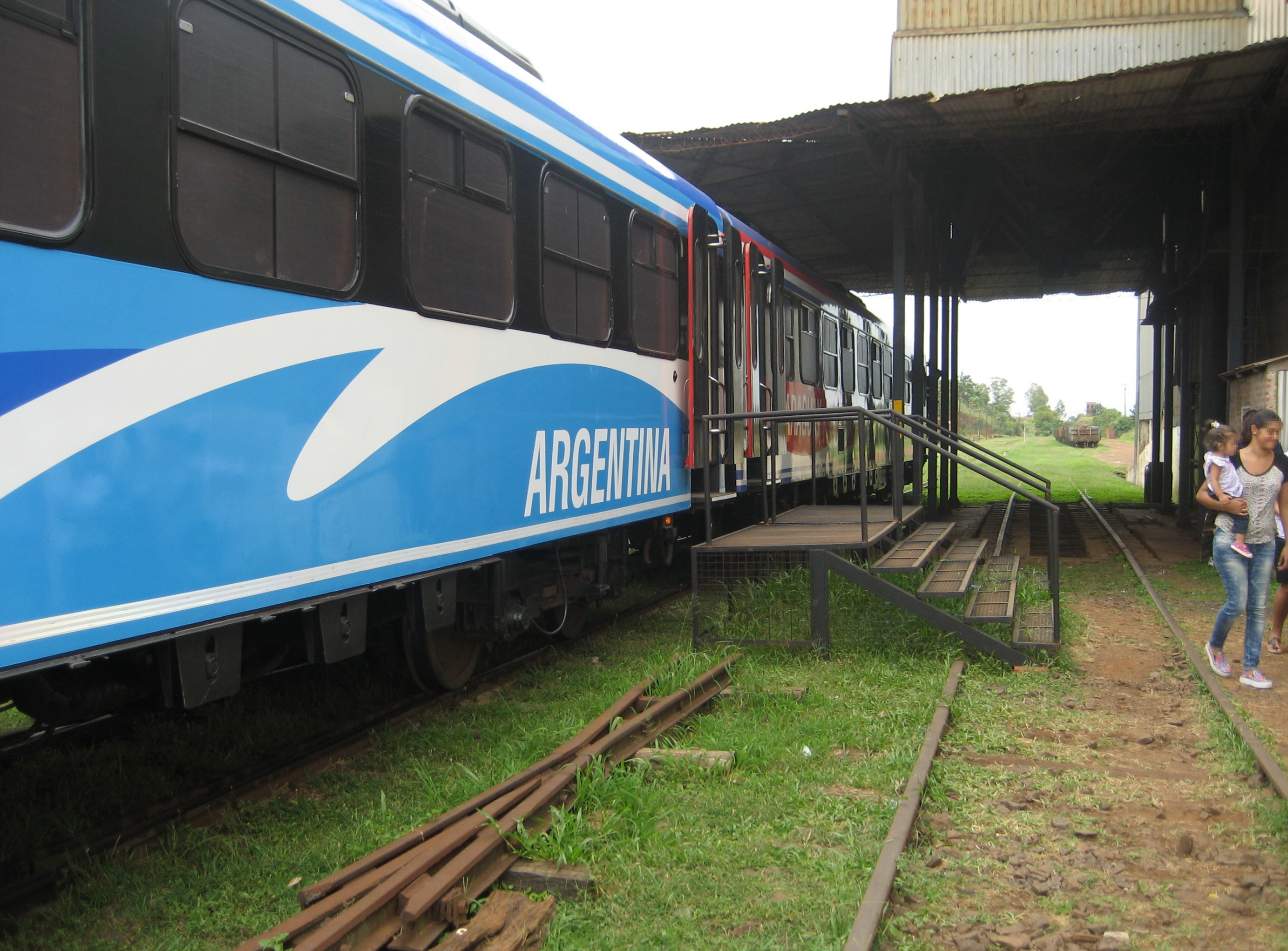 Apeadero provisorio en Encarnación, en un galpón de la playa de maniobras y cargas; el edificio del nuevo apeadero se está construyendo apenas unas metros más al nordeste